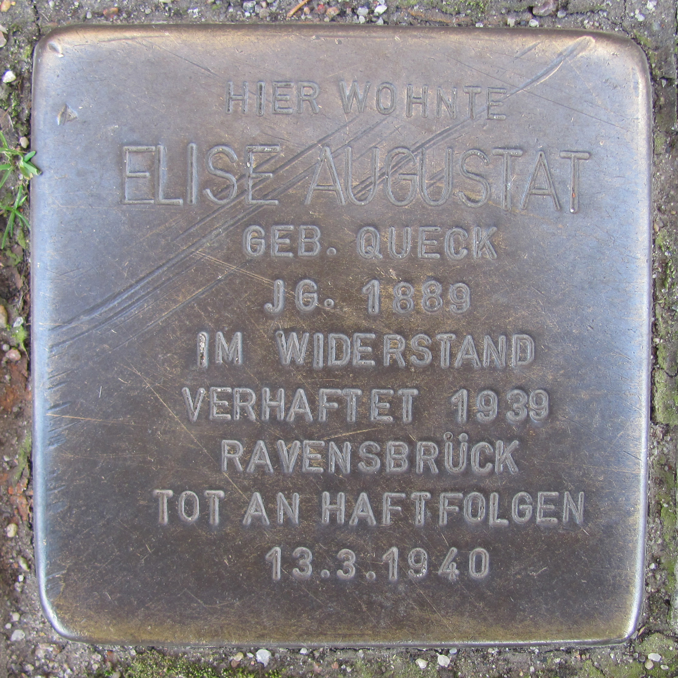 Stolperstein für Elisa Augustat am Fußweg von der Nordschleswiger Straße zum Haus Naumannplatz 1